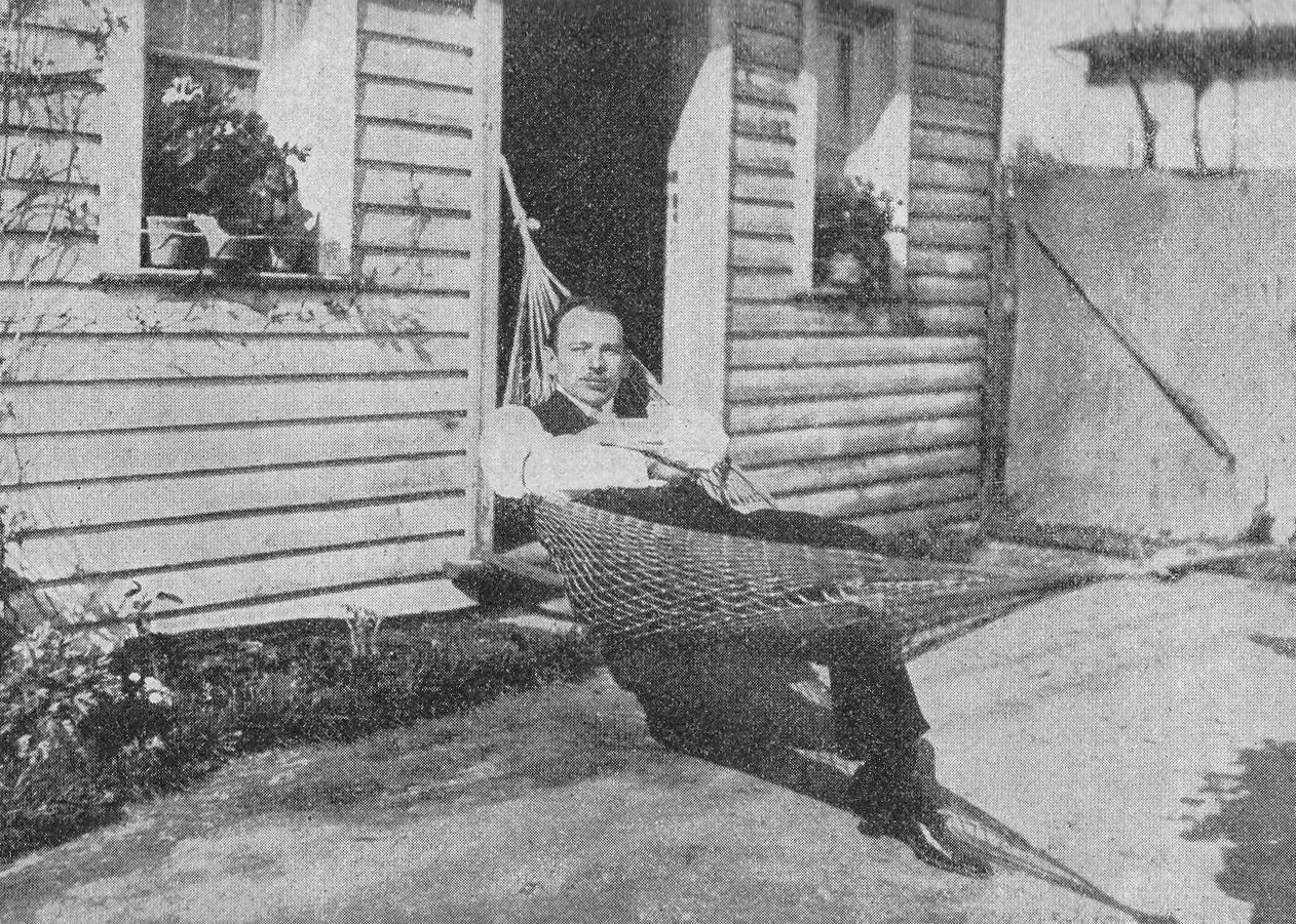 Fritz Theile, deutscher Radrennfahrer, auf der Radrennbahn Steglitz